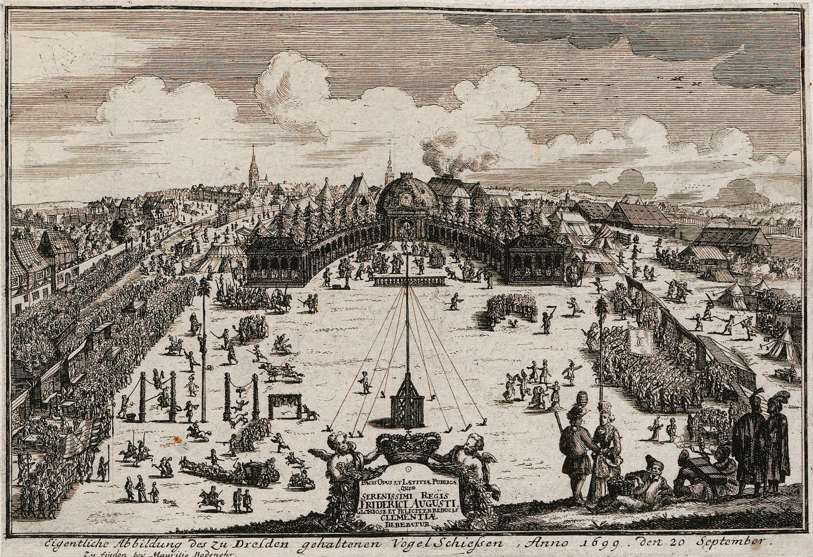 Grafik aus dem Klebeband Nr. 15 der Fürstlich Waldeckschen Hofbibliothek Arolsen. Motiv: Vogelschießen in Dresden am 20. September 1699